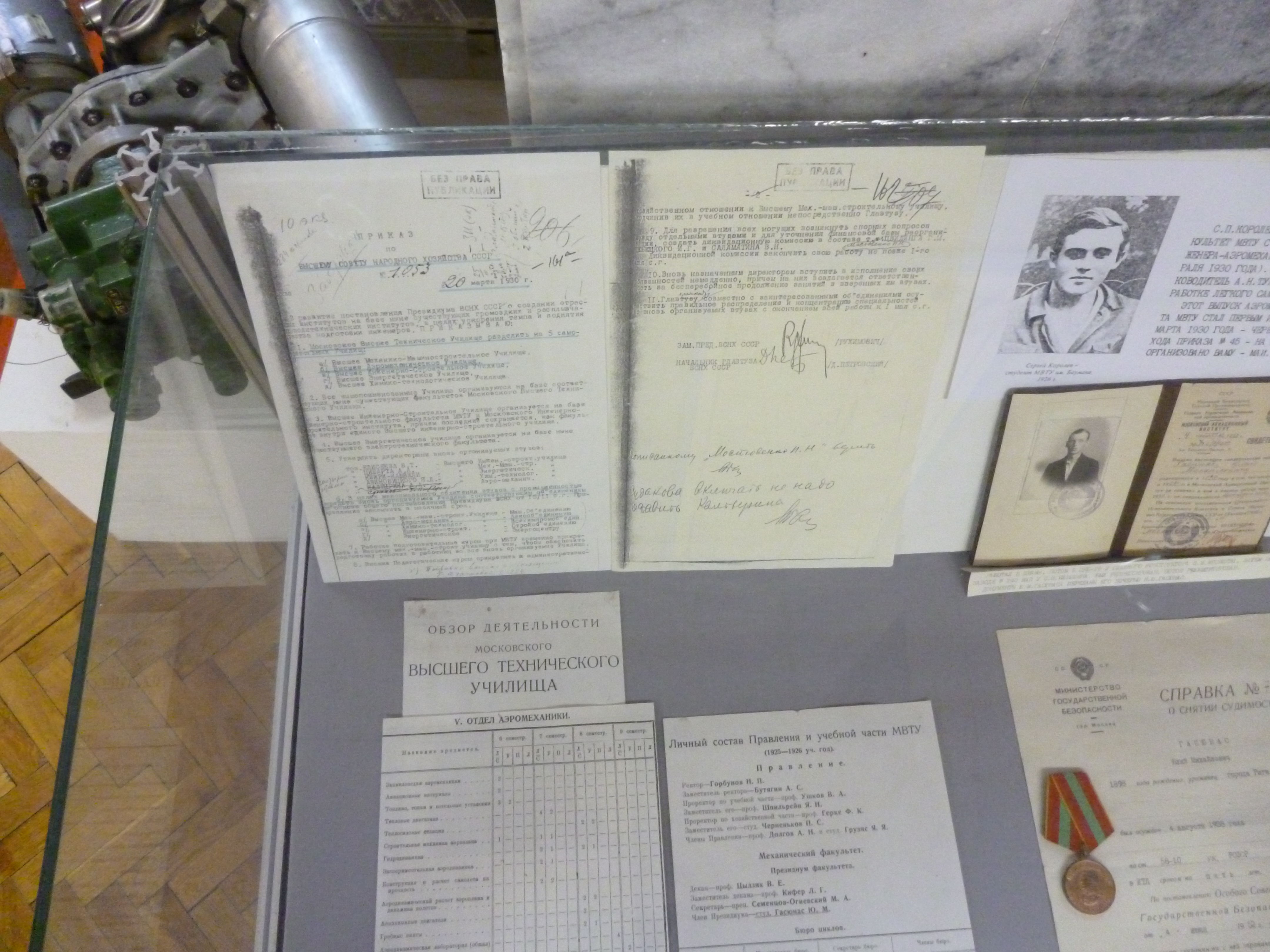 Музей МАИ